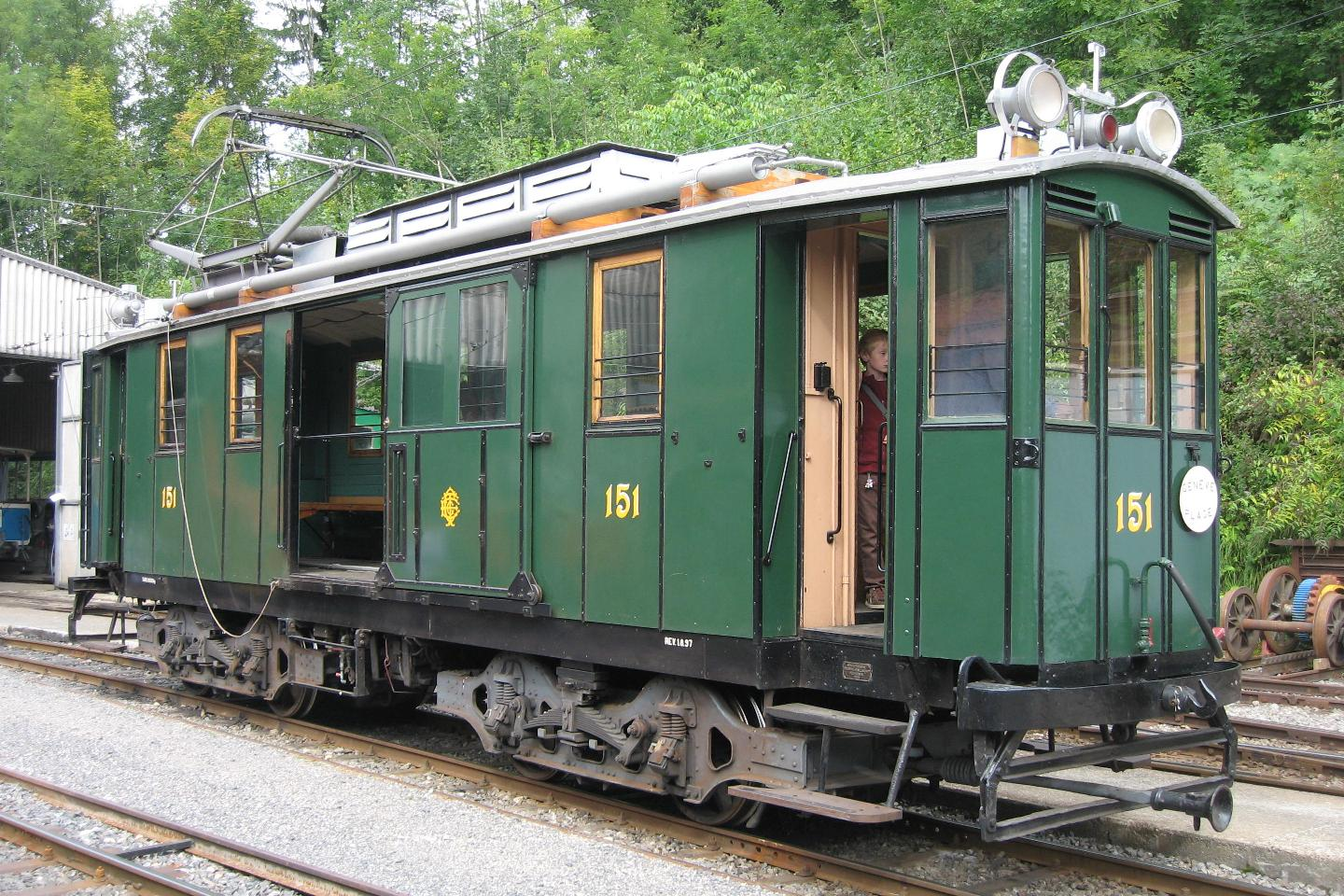 Historischer Strassenbahn Motorwagen Fe 4/4 151 der ehemaligen Compagnie Genevoise des Tramways Électriques (CGTE), heute Transports Publics Genevois (TPG), auf dem Museumsareal Chamby-Musée (Chaulin) der Museumsbahn Blonay–Chamby (BC).